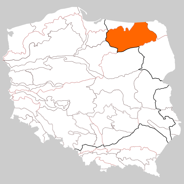 Physico-geographical regionalization of Poland Macroregion 842.8 Masurian Lakeland Regionalizacja fizycznogeograficzna Polski Makroregion 842.8 Pojezierze Mazurskie